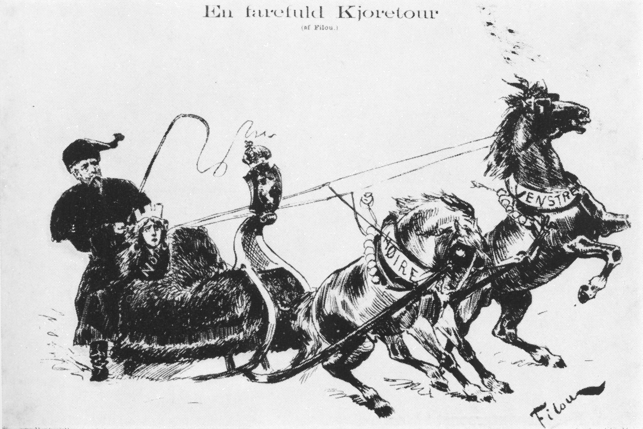 Skämtteckning ur Vikingen 1884 under riksrättens slutskede.